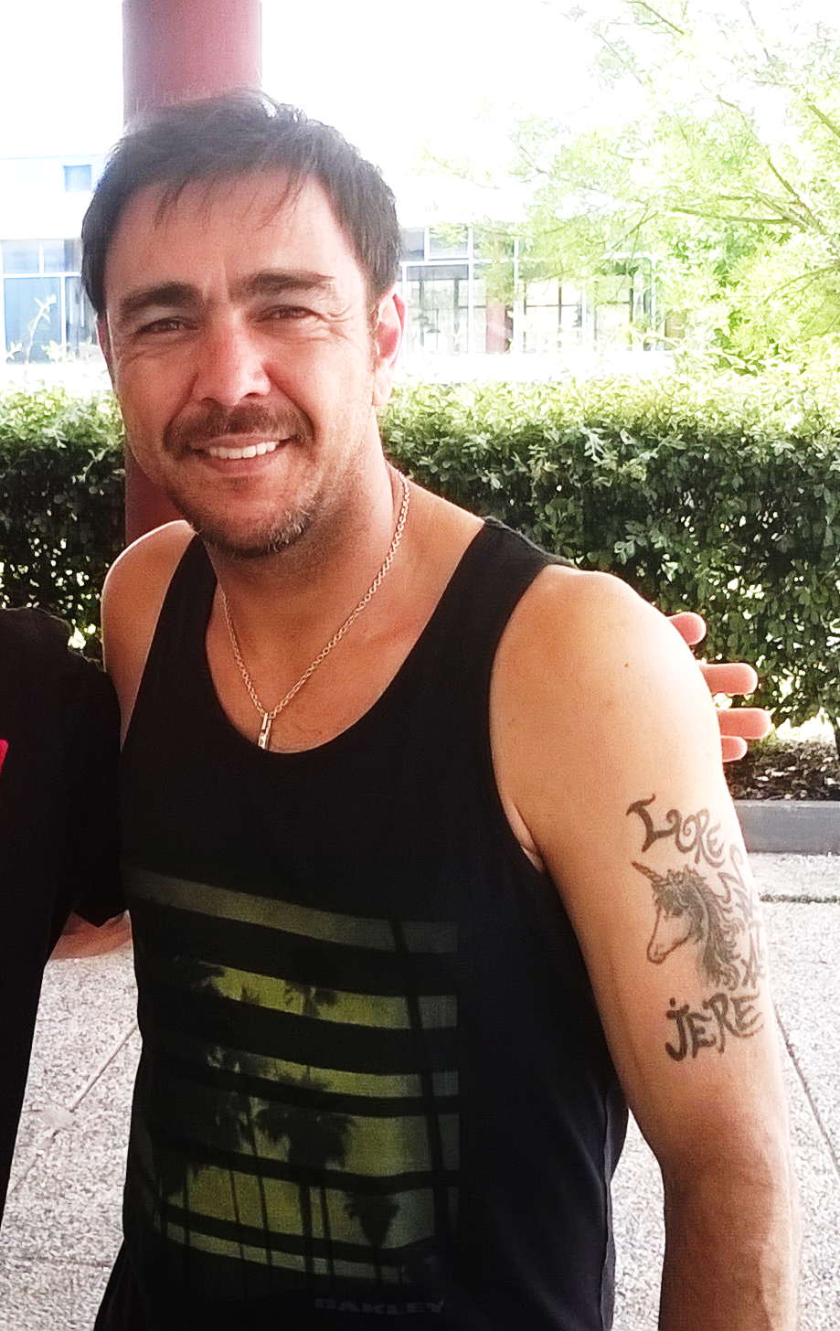 Foto del Chino Recoba